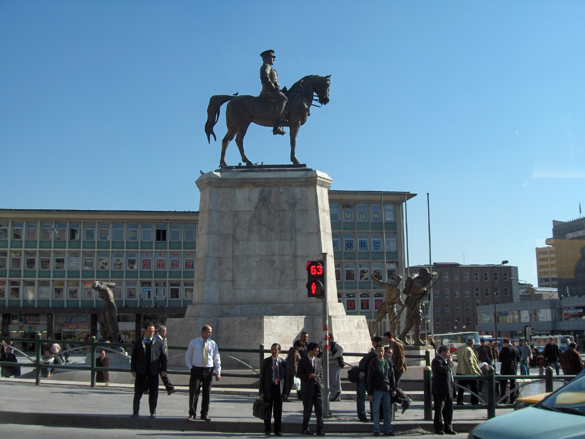 Statue of Ataturk; Ankara, Turkey